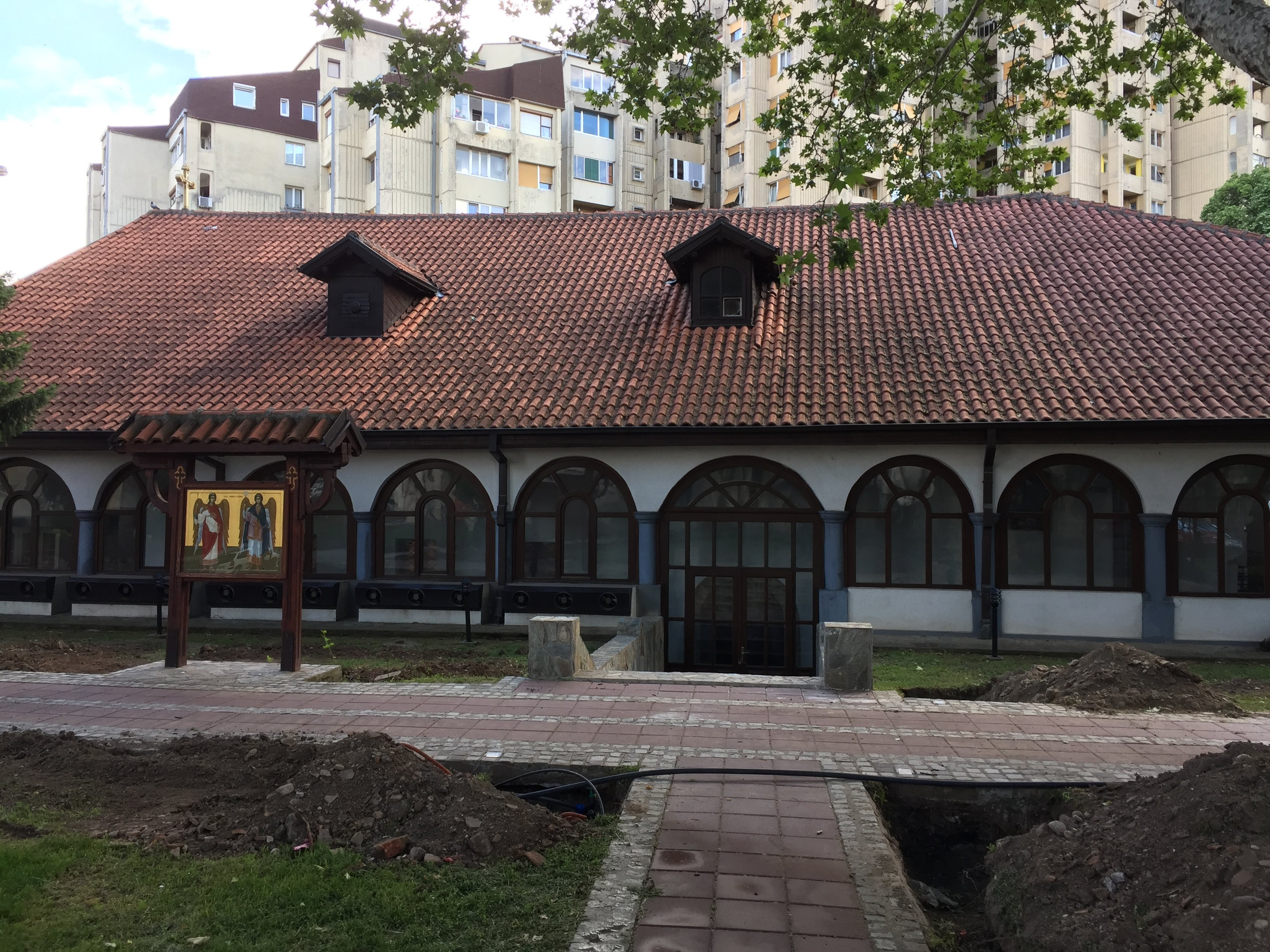 Srpski (latinica): Crkva Svetih arhanđela Mihaila i Gavrila u Nišu